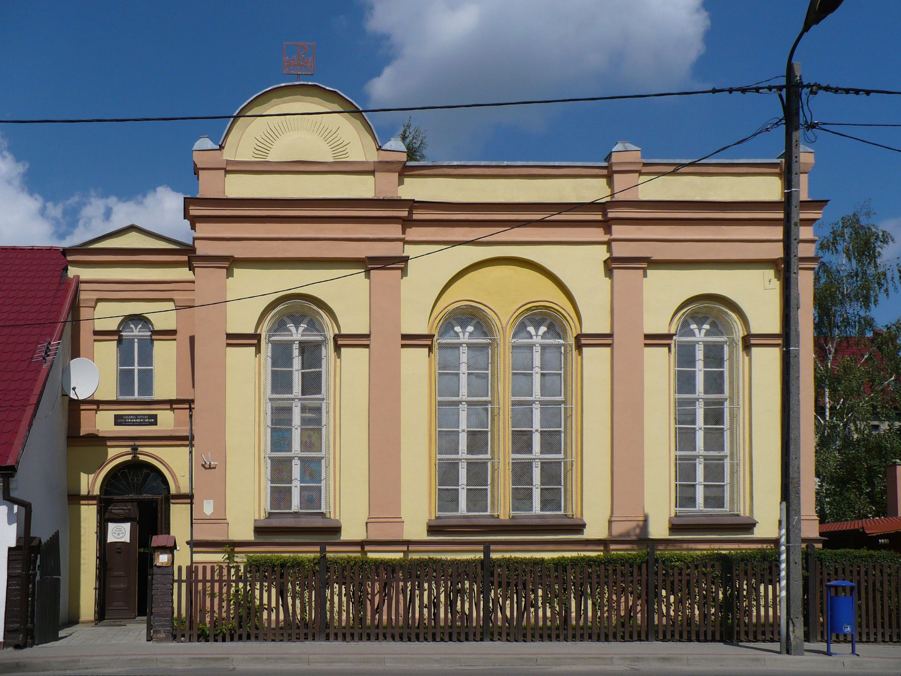 Synagoga w Barczewie